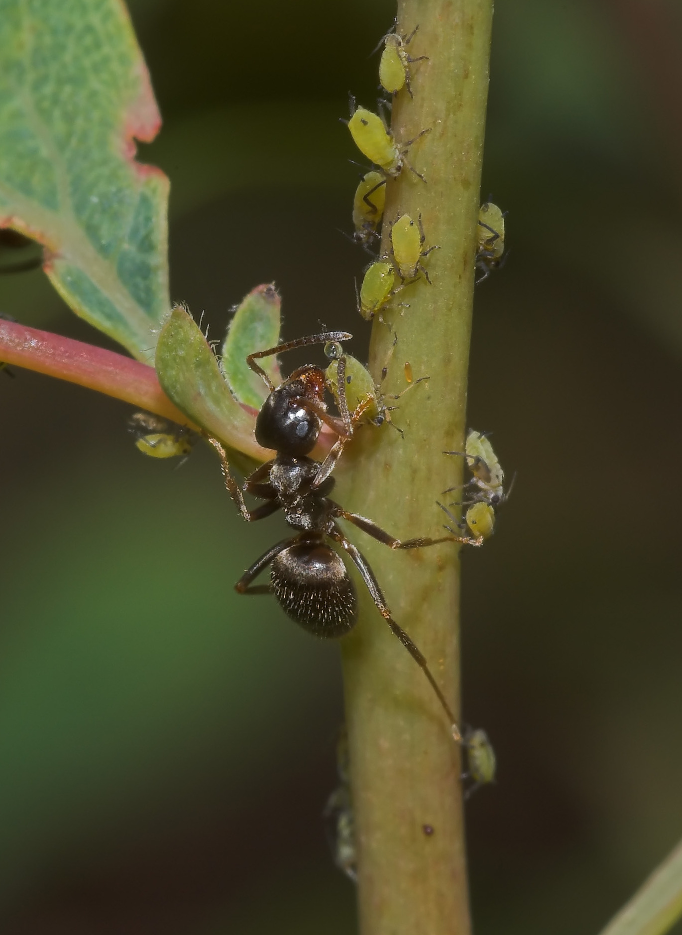 Ameise beim Melken von Honigtau